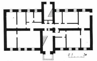 БДСГА. Дзіцячы сад. План першага паверха.